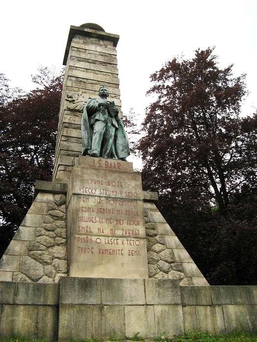 Pomník Jindřicha Šimona Baara (Capartice), Výhledy, vpravo nad silnicí směr Klenčí p. Č. - Nemanice, Capartice